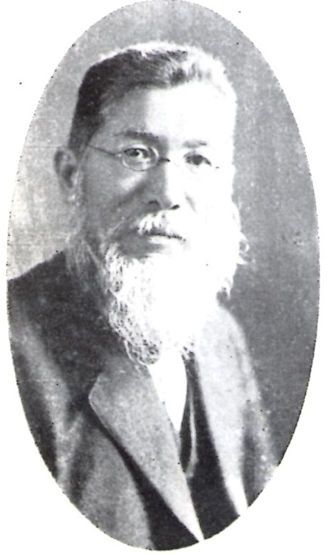 昭和7年、札幌放送局が出版した『北海道郷土史研究』に掲載。 This photographic image was published before December 31st 1956, or photographed before 1946, under the jurisdiction of the Government of Japan. Thus this photographic image is considered to be public domain according to article 23 of old copyright law of Japan (English translation) and article 2 of supplemental provision of copyright law of Japan. To uploader: Please provide an image source.